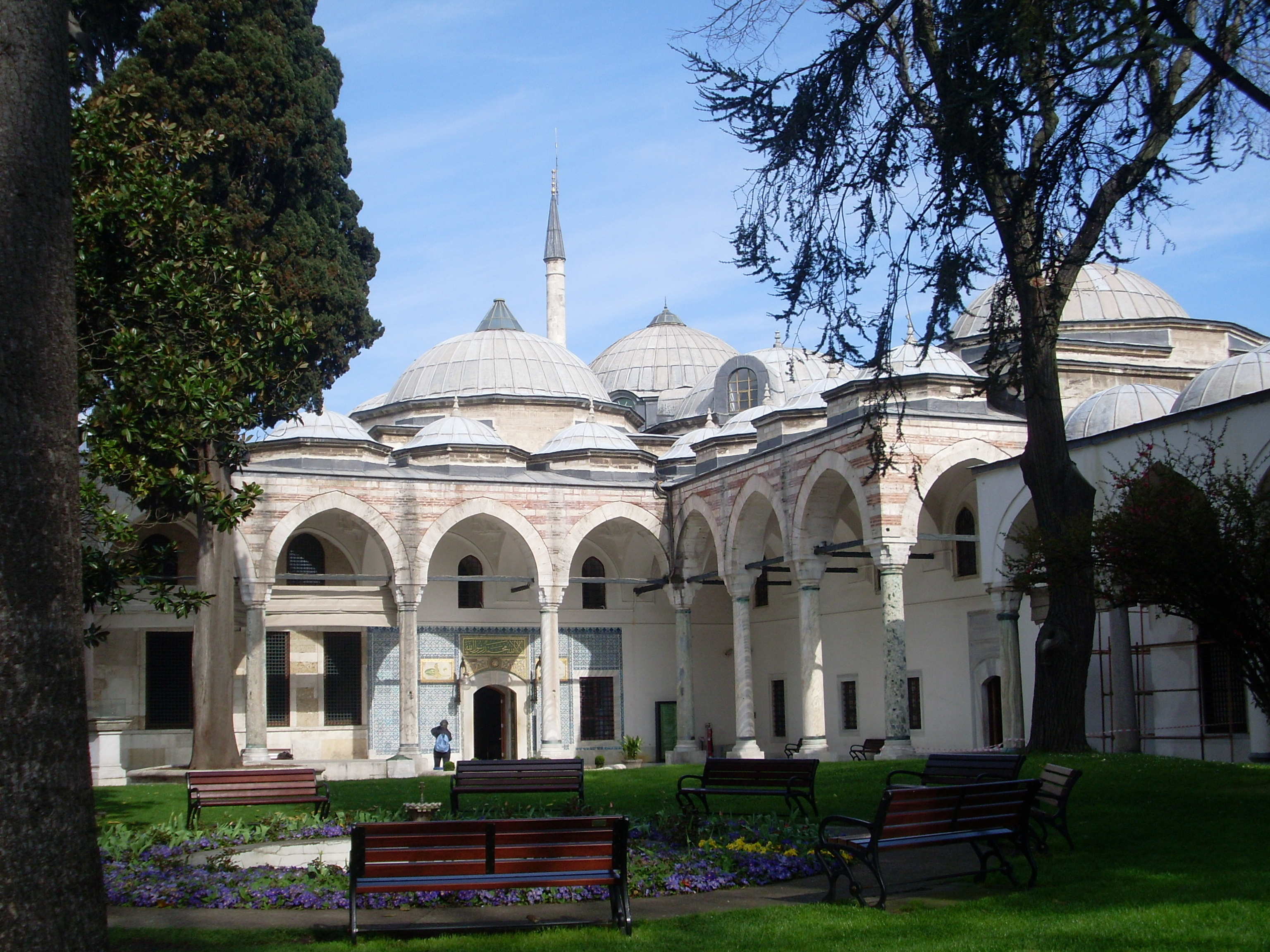 Palacio de Topkapi, jardines, Estambul, Turquía, abril de 2011